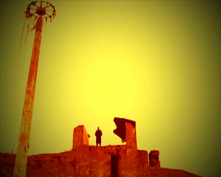 Аркадий Ипполитов в фильме "Список кораблей" (2008).